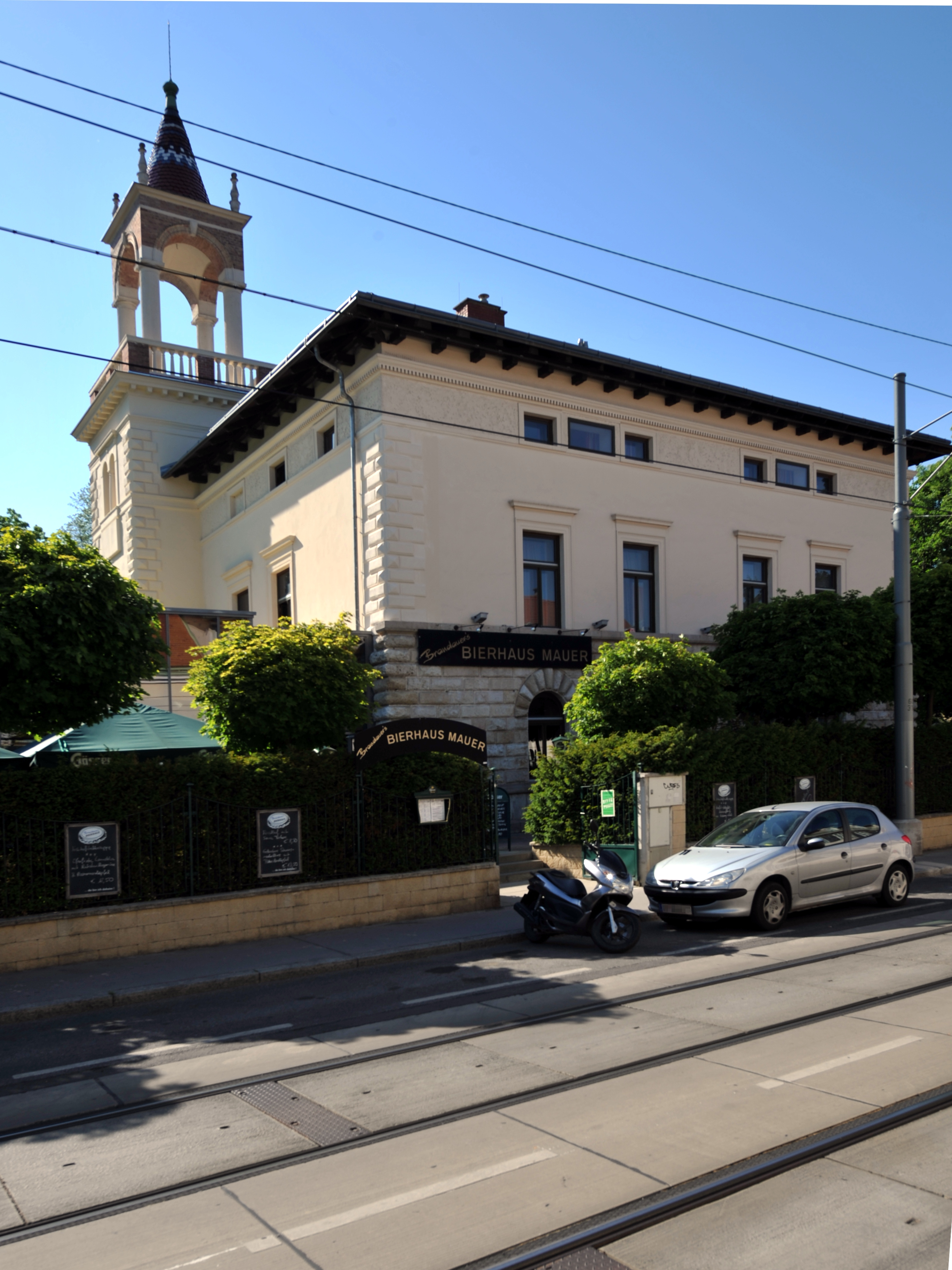 Villa/Landhaus, ehemaliges Park-Café